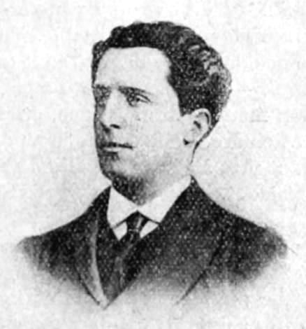 "Après avoir été professeur au Lycée de Tournon (Ardèche). L. Grégori, rédacteur en chef de La Sarthe, Le Mans, 1869".